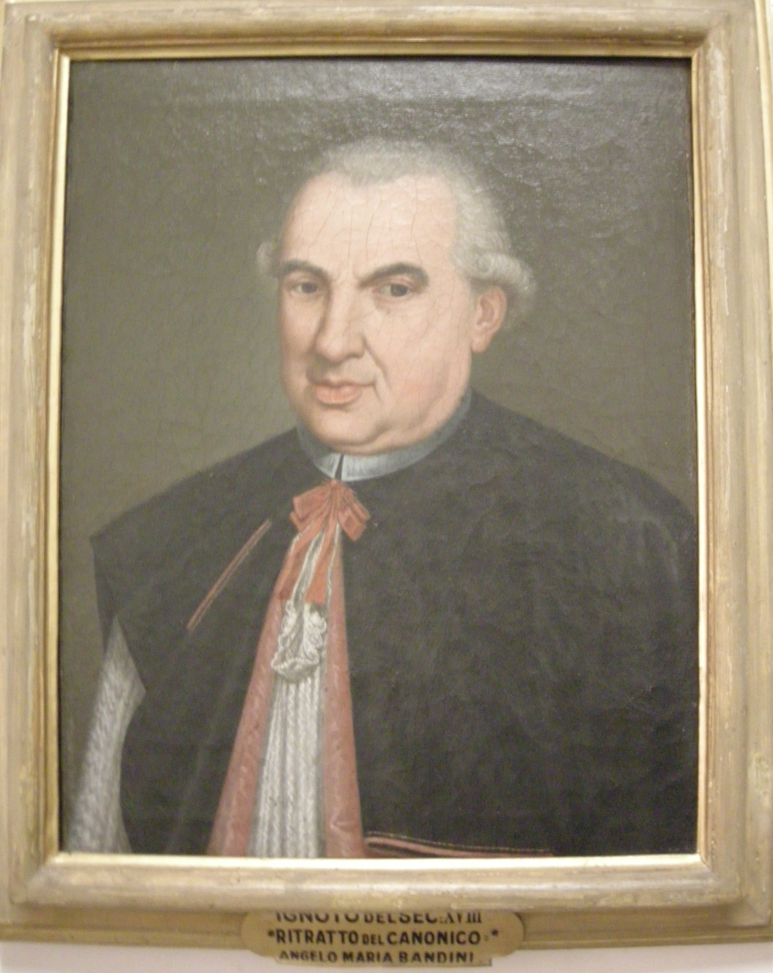 Ritratto del canonico angelo maria bandini, xviii sec.